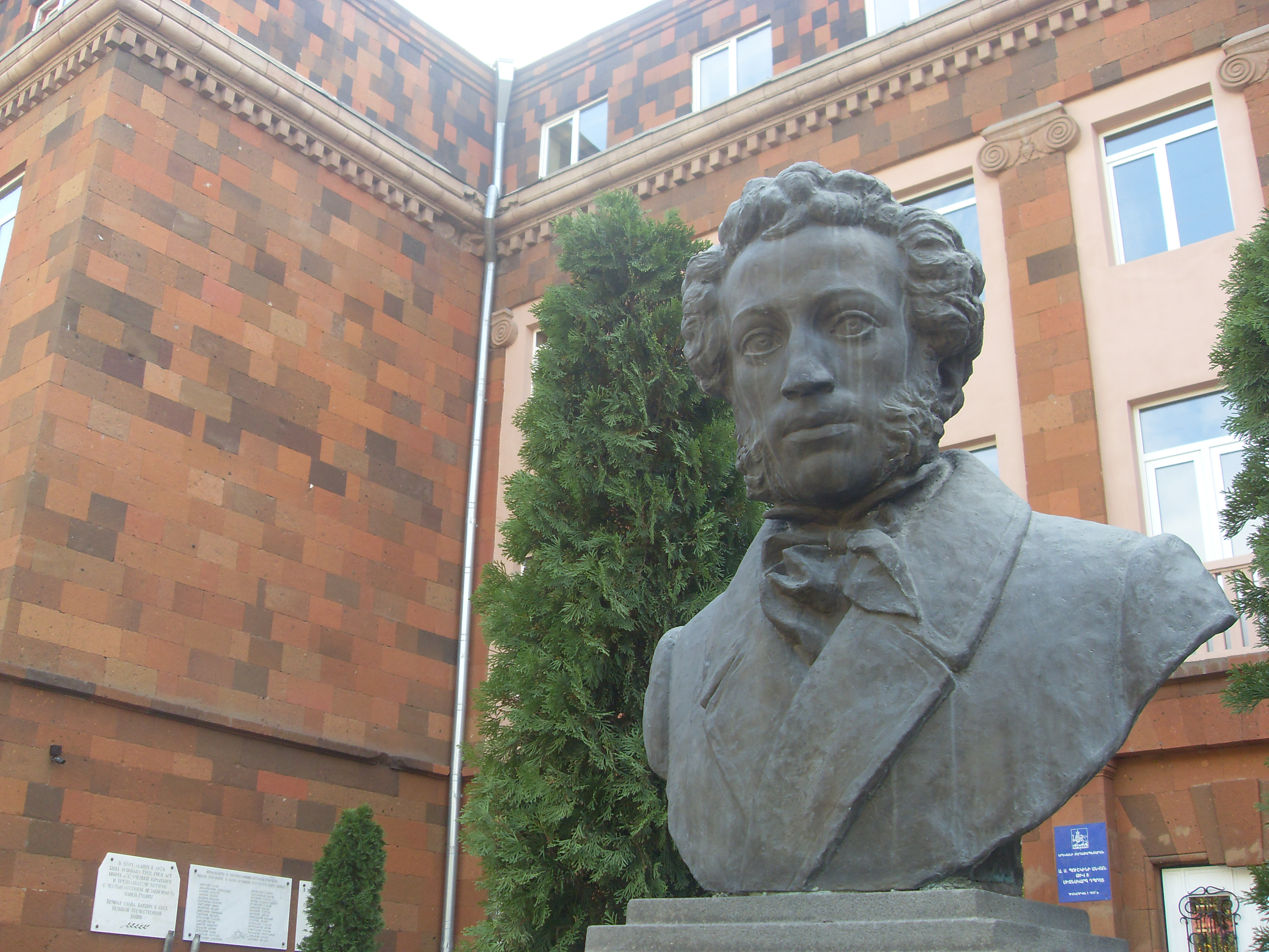 Ալեքսանդր Պուշկինի հուշարձան, նրա անվան թիվ 8 դպրոցի դիմաց, 1949 թ., քանդ.` Գ. Ահարոնյան